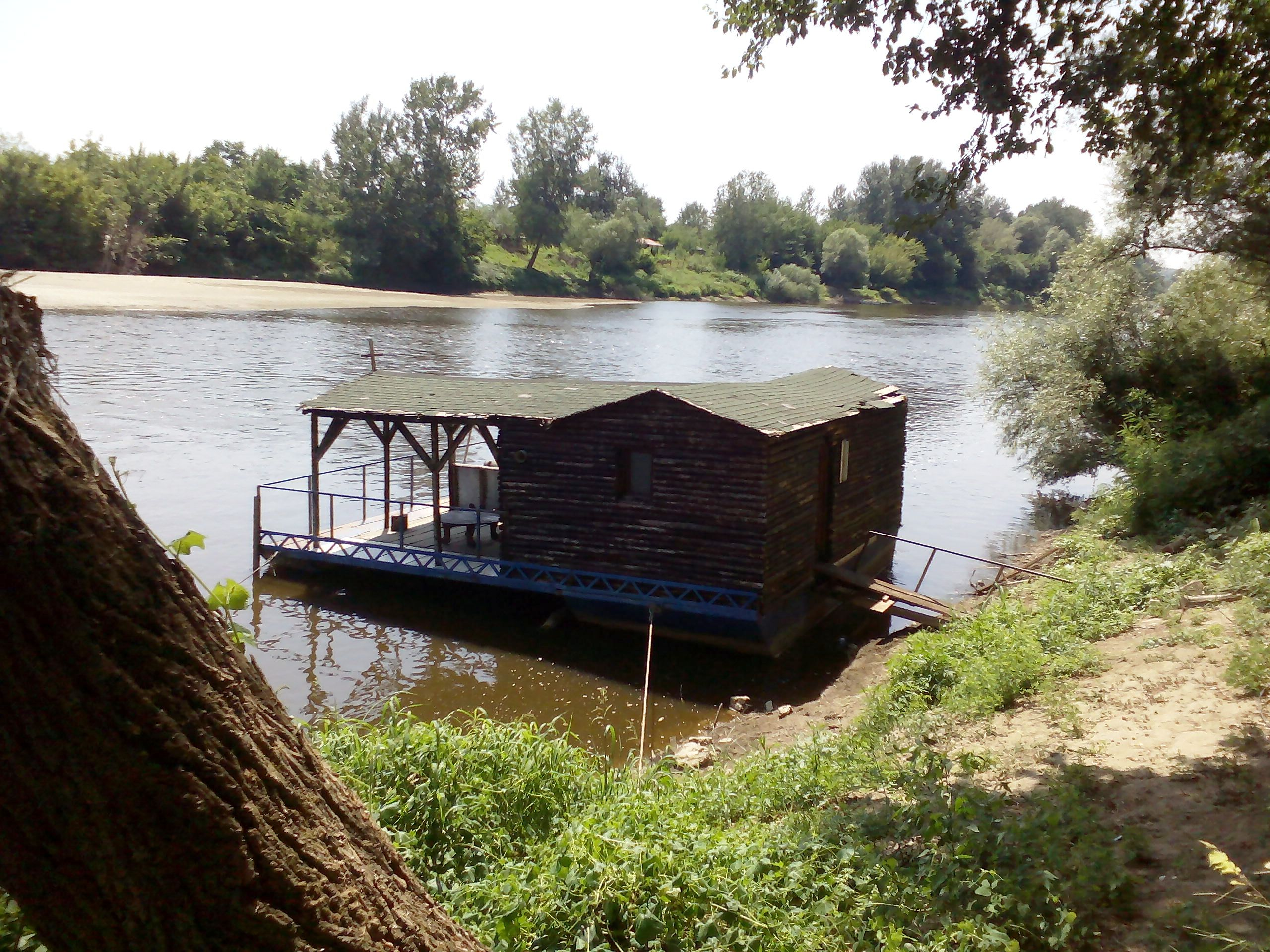 Манастир који се налази поред Велике Мораве, недалеко од села Гложане код Свилајнца